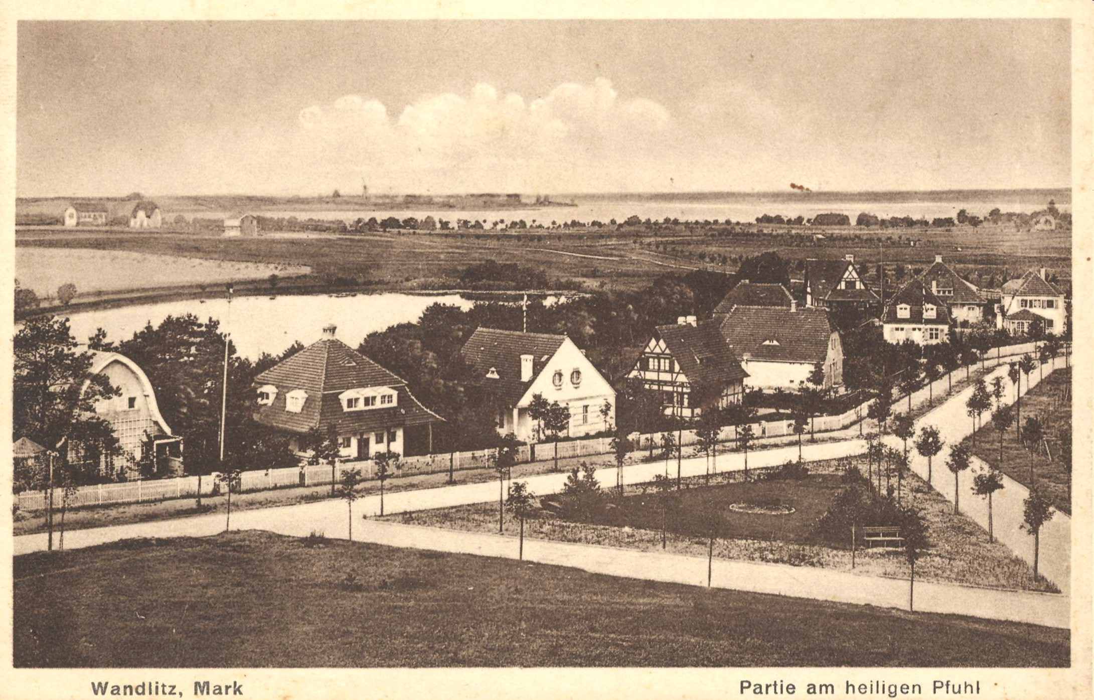 Partie am Heiligen Pfuhl